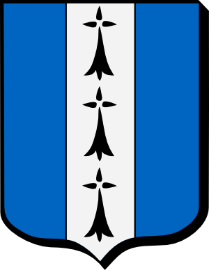 Blason familial des Le Doüarain de Lémo